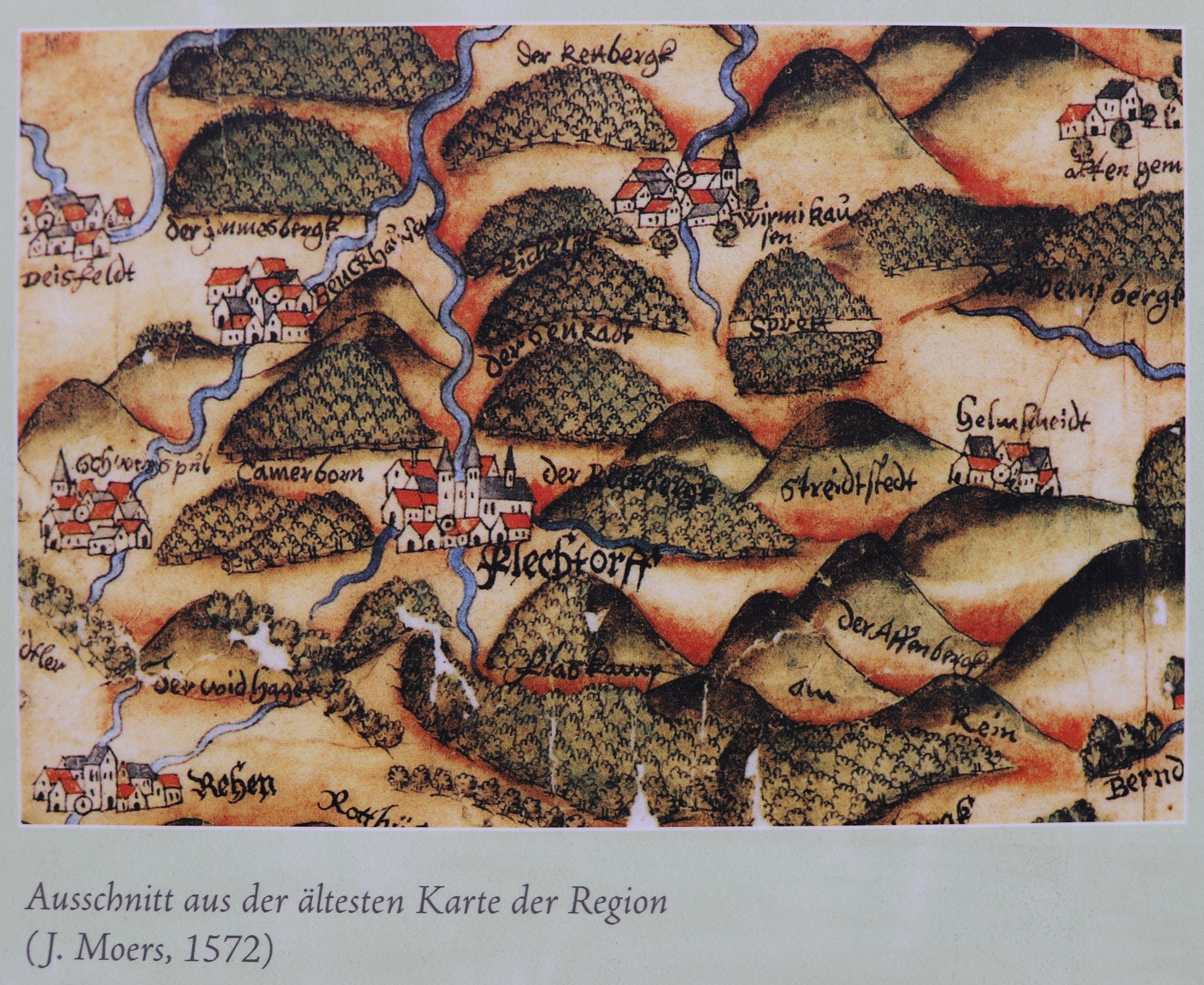 Älteste Karte der Region Diemelsee, Moers 1572